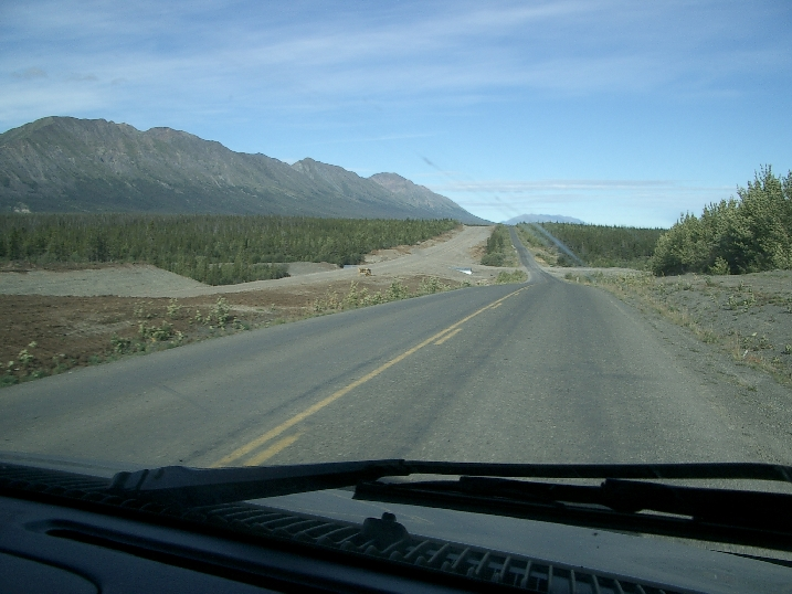 Auf dem Alaska Highway in Richtung Norden nördlich von 'Destruction Bay'.